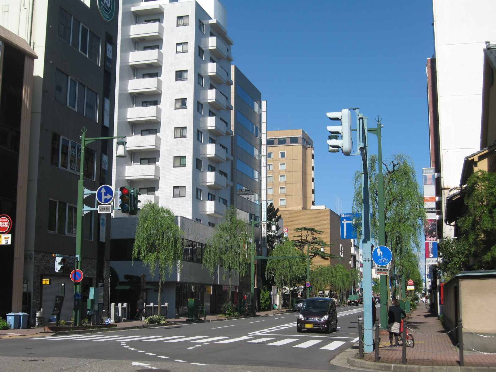 新潟県新潟市中央区。西堀通7番町の画像。